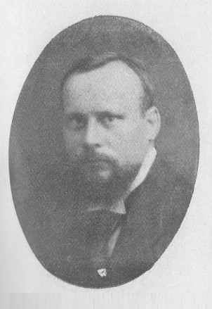 Vincenc Lesný (1882 - 1953), Český indolog, překladatel a orientalista.